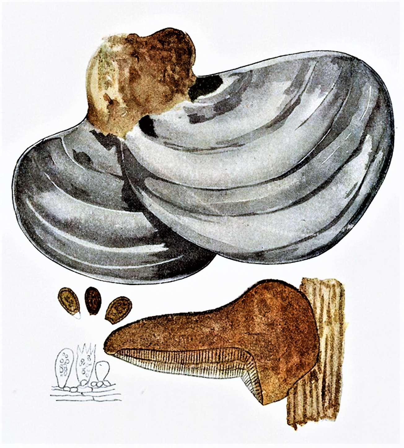 Giacomo Bresadola: = Ganoderma applanatum (Pers., 1801 ex Pat. (1887)